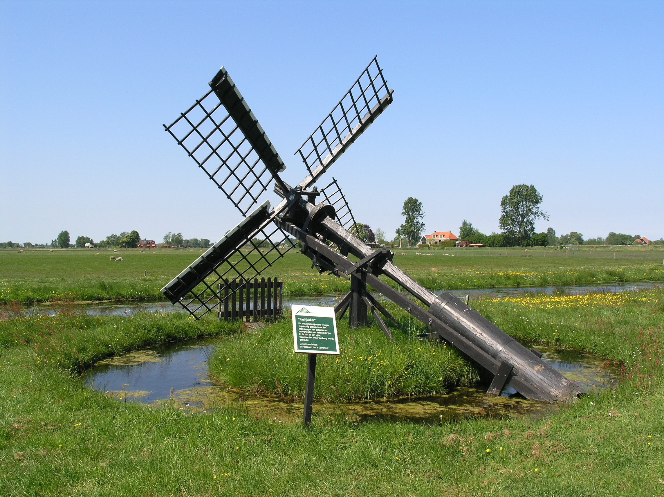 Nij Beets Tjasker Windmolen